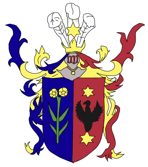 Herb rodziny Lalewiczów- Woroniec